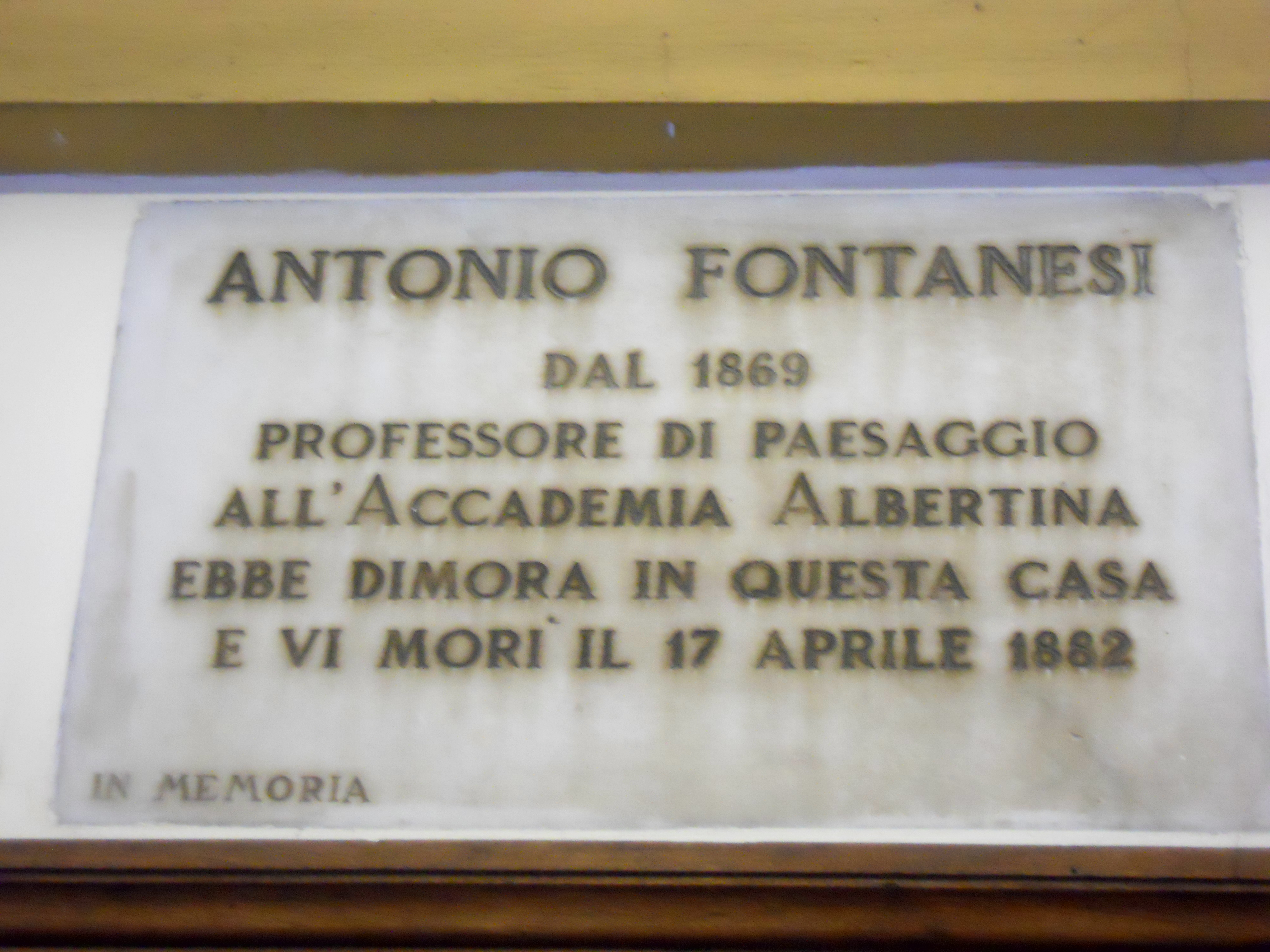 Targa dedicata ad Antonio Fontanesi, nell'androne del Palazzo